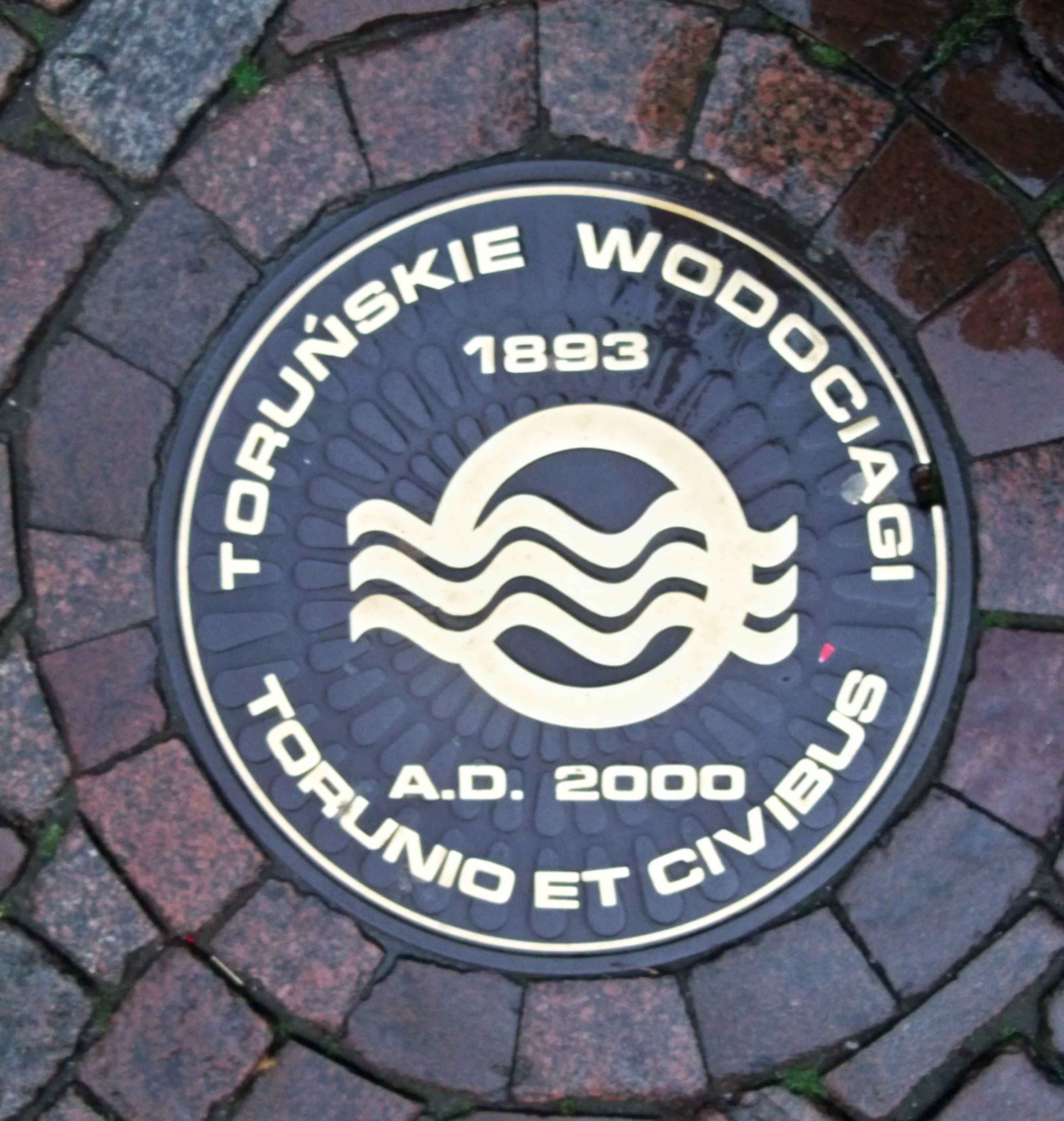 Pokrywa studzienki kanalizacyjnej toruńskich wodociągów ("Torunio et civibus")